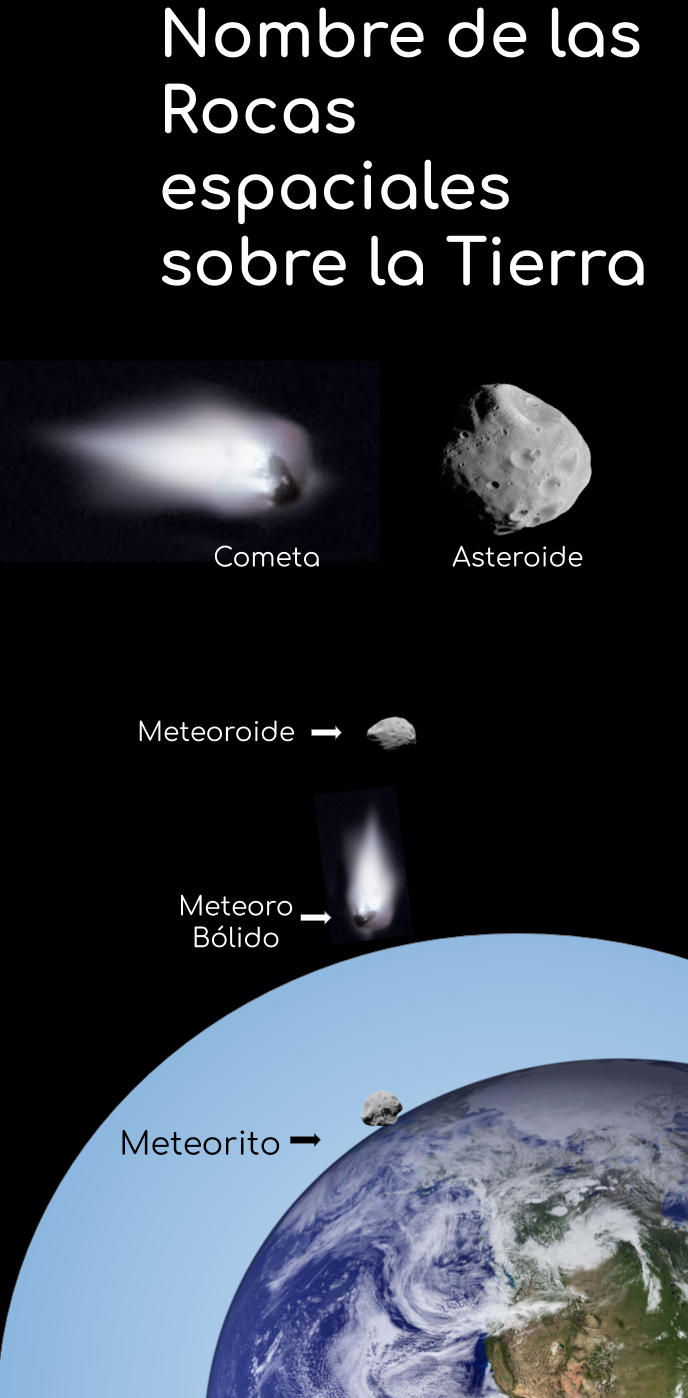 Los diferentes nombres que se le pueden dar a las rocas espaciales dependiendo a la distancia de la superficie Terrestre